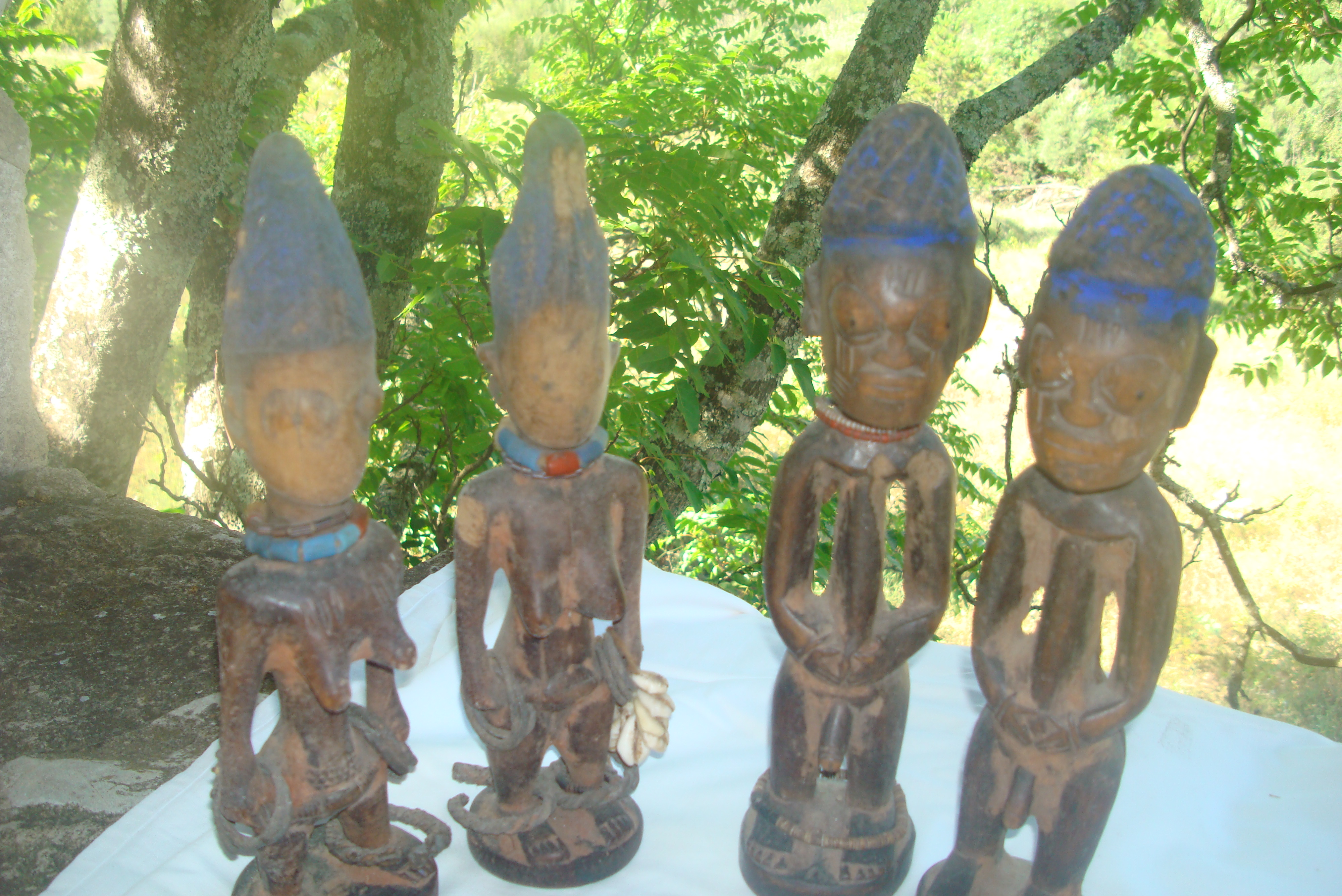 Igbeji Orossi